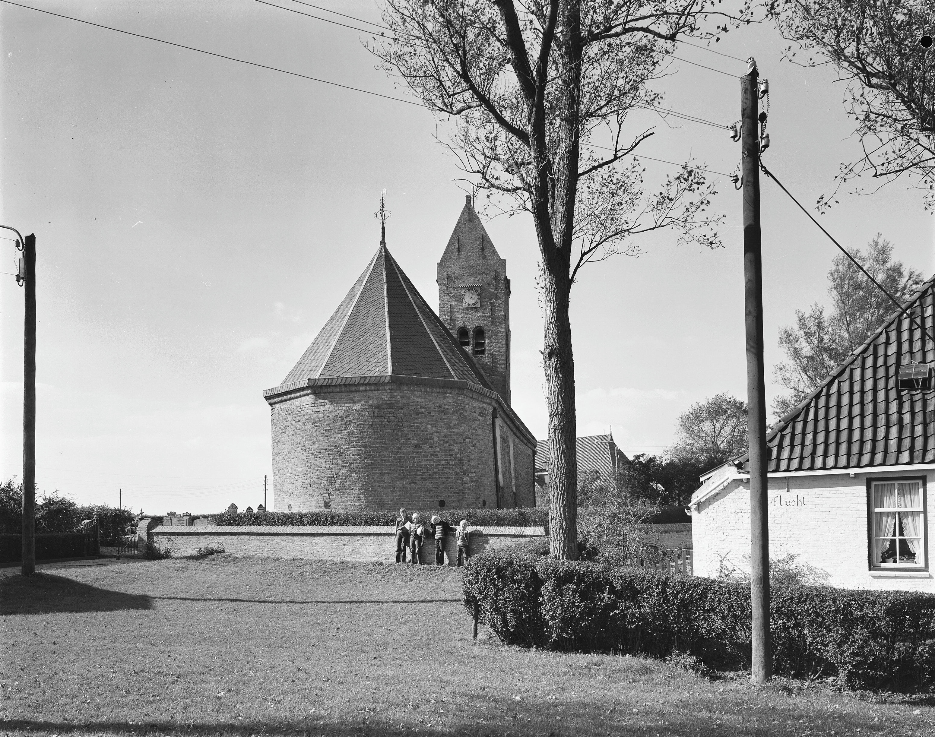 Nederlands Hervormde Kerk: overzicht